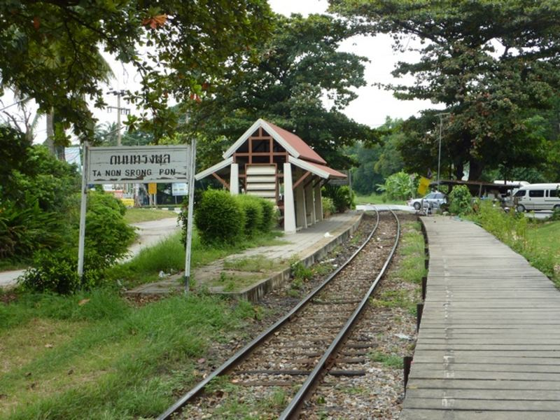 ป้ายหยุดรถถนนทรงพล